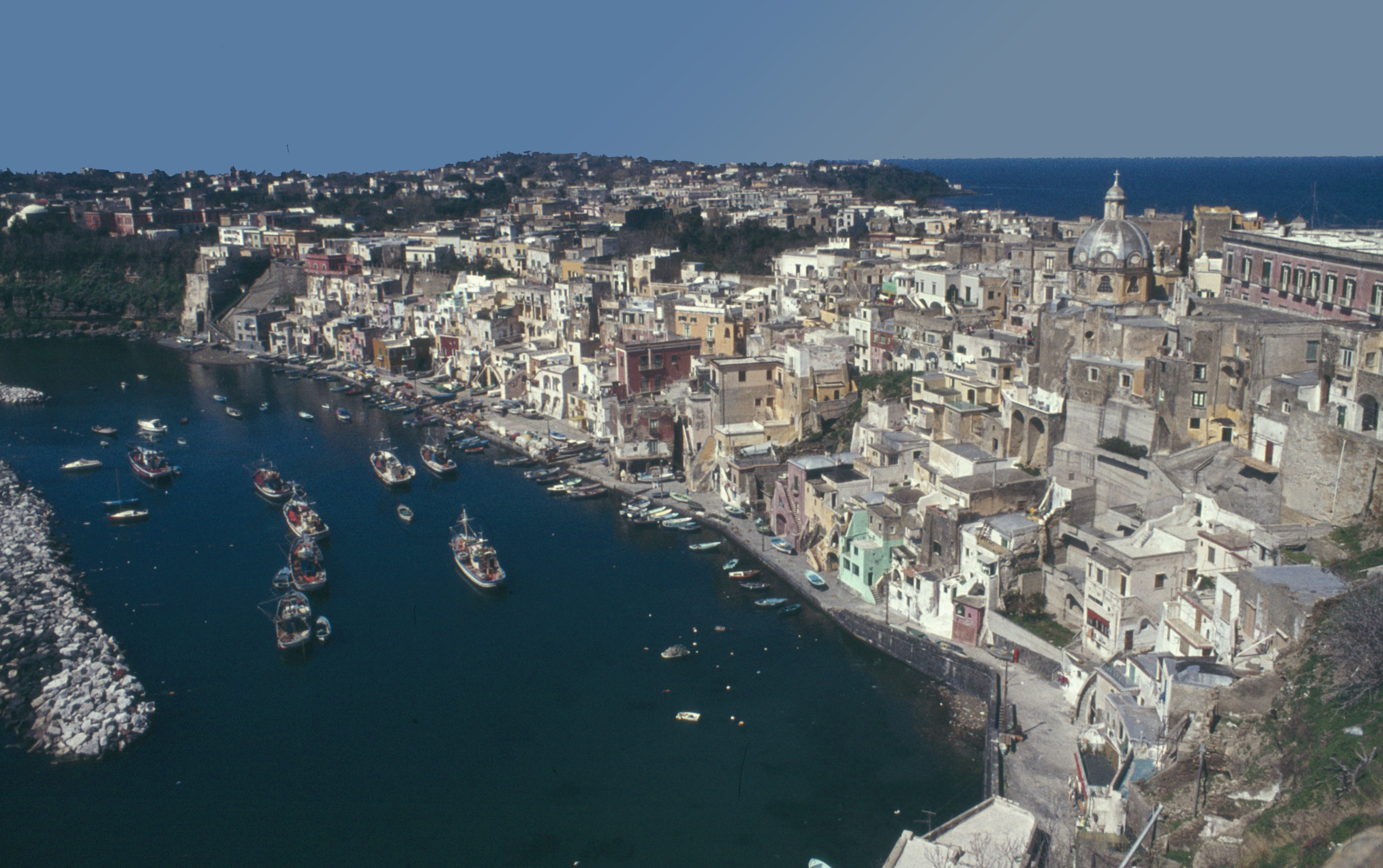 Procida